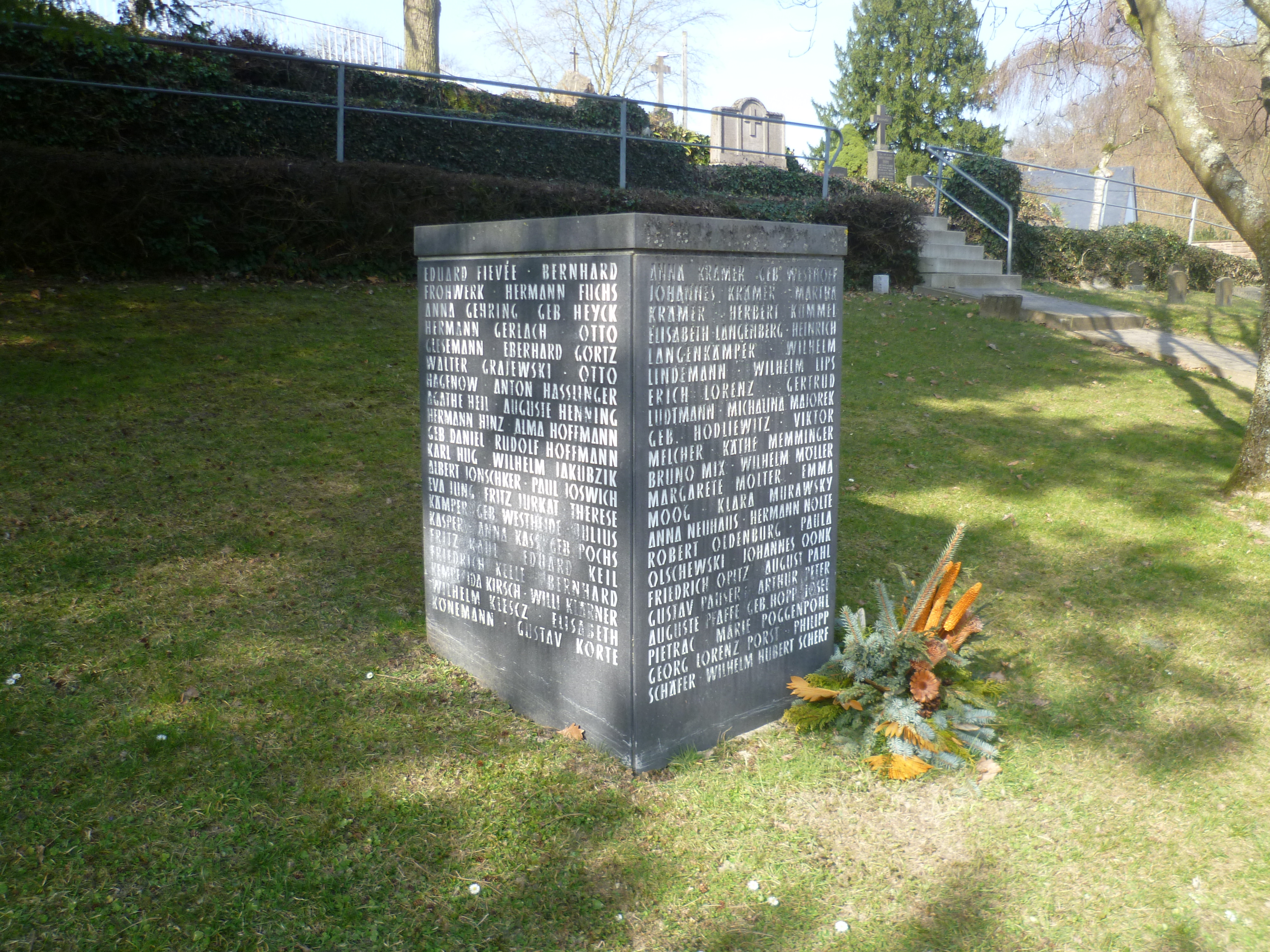 Gedenkstein für die rund 130 Opfer der Euthanasie-Verbrechen, die beim Aufenthalt an den Heimen Scheuern verstarben.